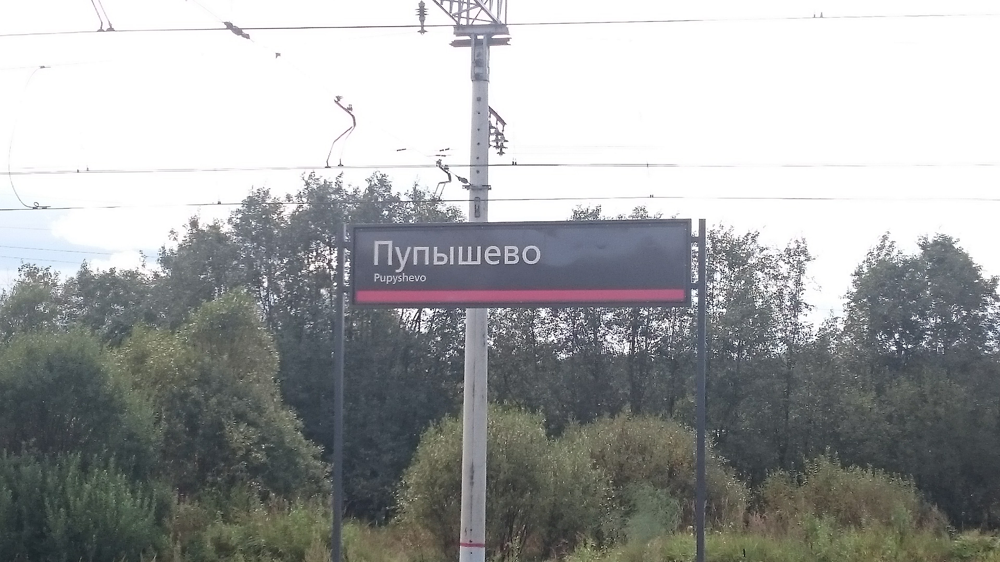 Платформа Пупышево, август 2016